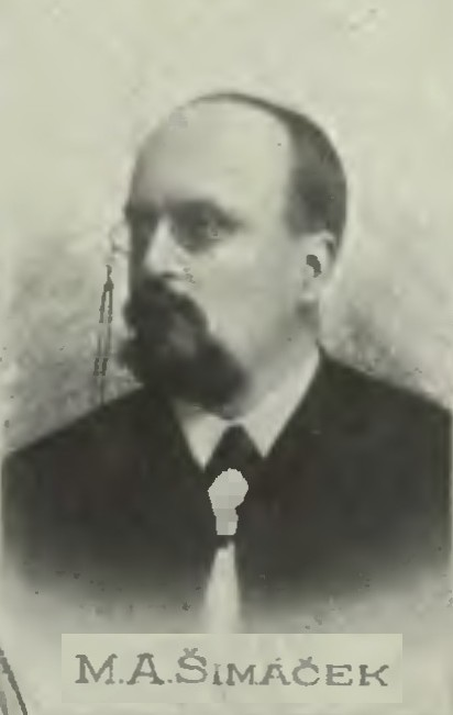 Portrét – Matěj Anastasia Šimáček (1860-1913), Český spisovatel a novinář.